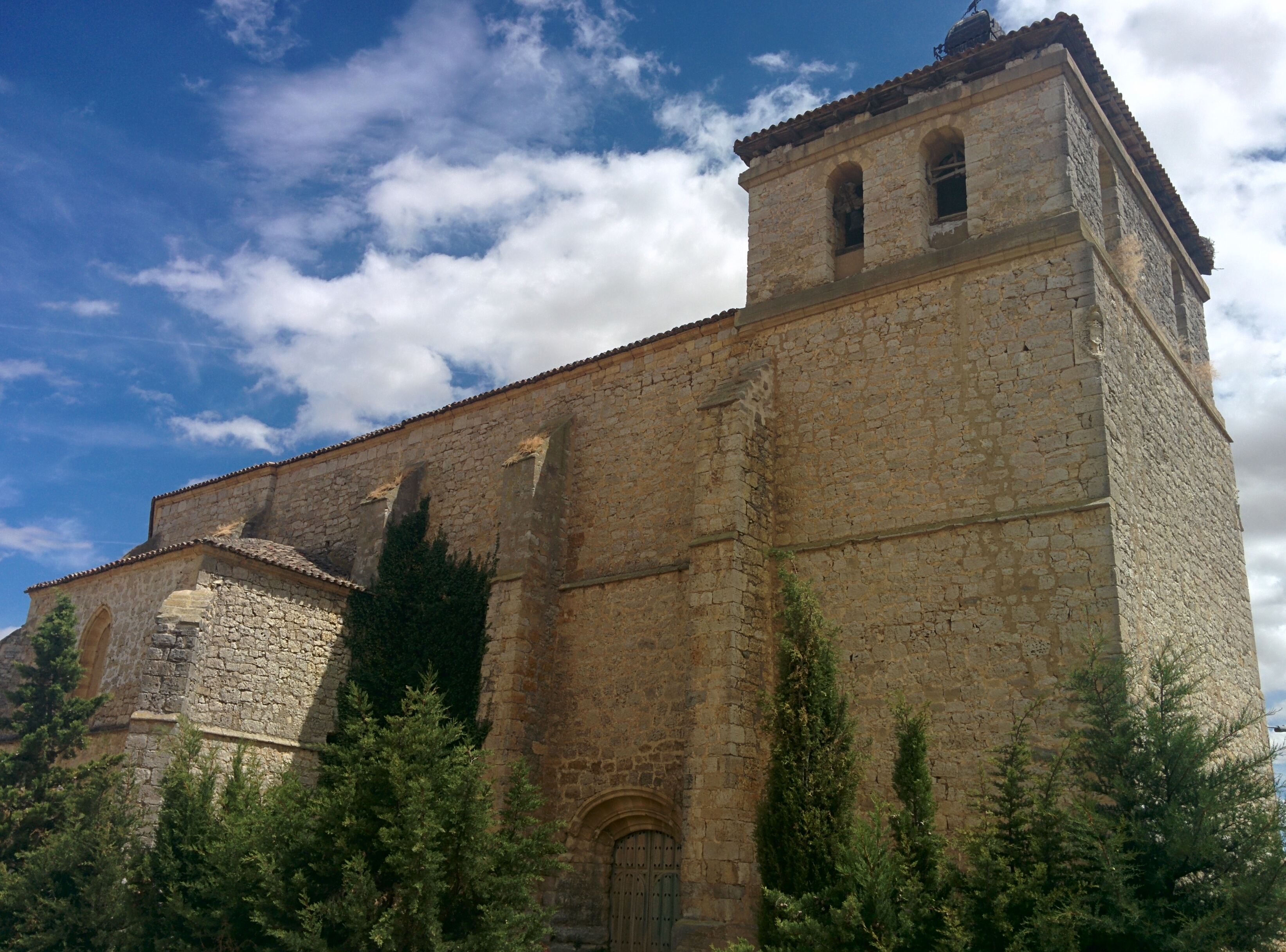 Iglesia de San Miguel, en Requena de Campos (Palencia, España).